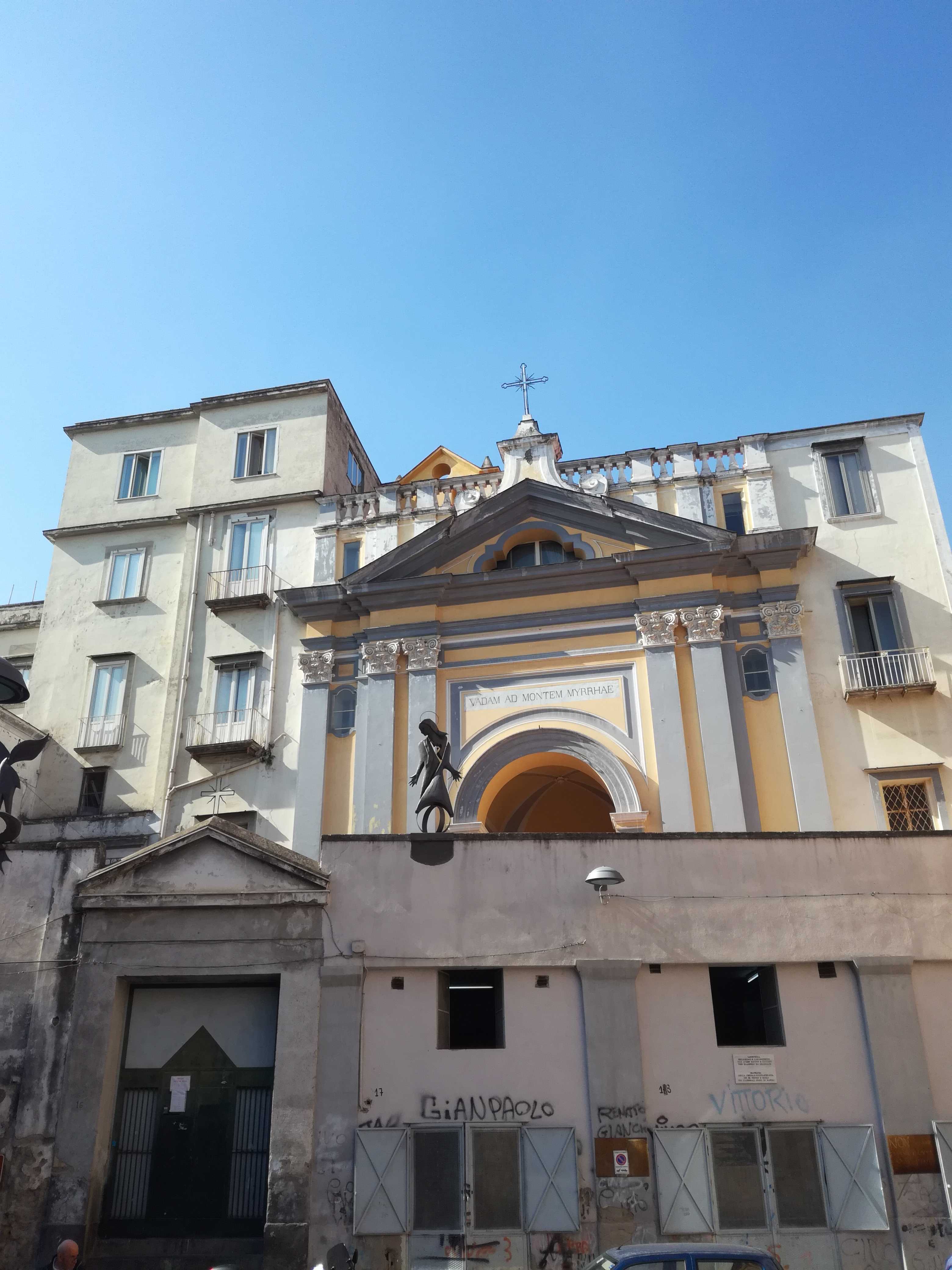 Esterno, Chiesa di Montecalvario, Napoli